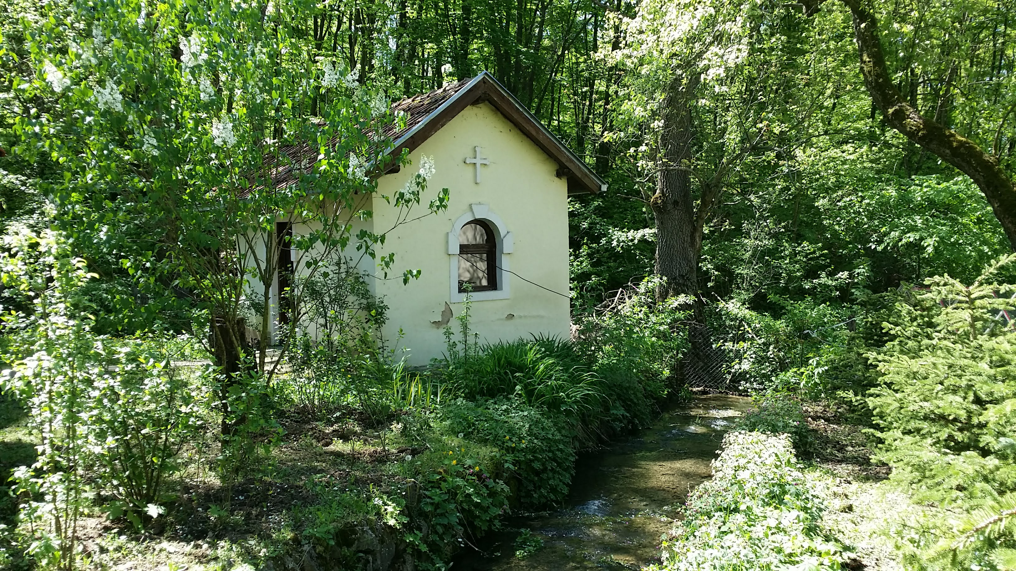 objekat